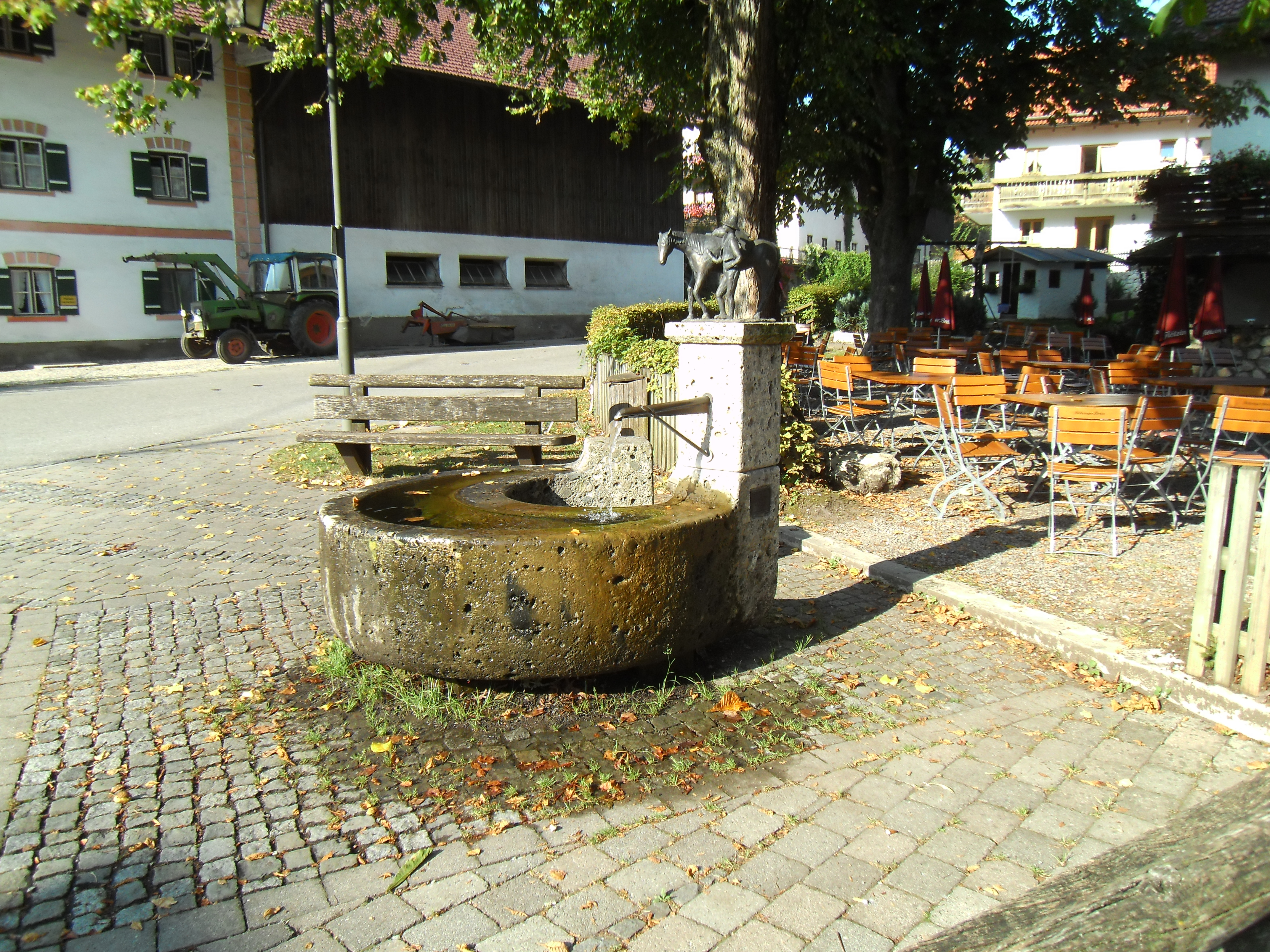 Grainbach (Gemeinde Samerberg, Lk. Rosenheim, Obb.), der sogenannte "Samerbrunnen" vor dem Biergarten des Gasthauses Maurer. Auf dem Denkmal, das 1997 erbaut wurde, steht eine Bronzestatuette, die einen "Säumer" (historisches Transportgewerbe) mit seinem Samross darstellen soll.